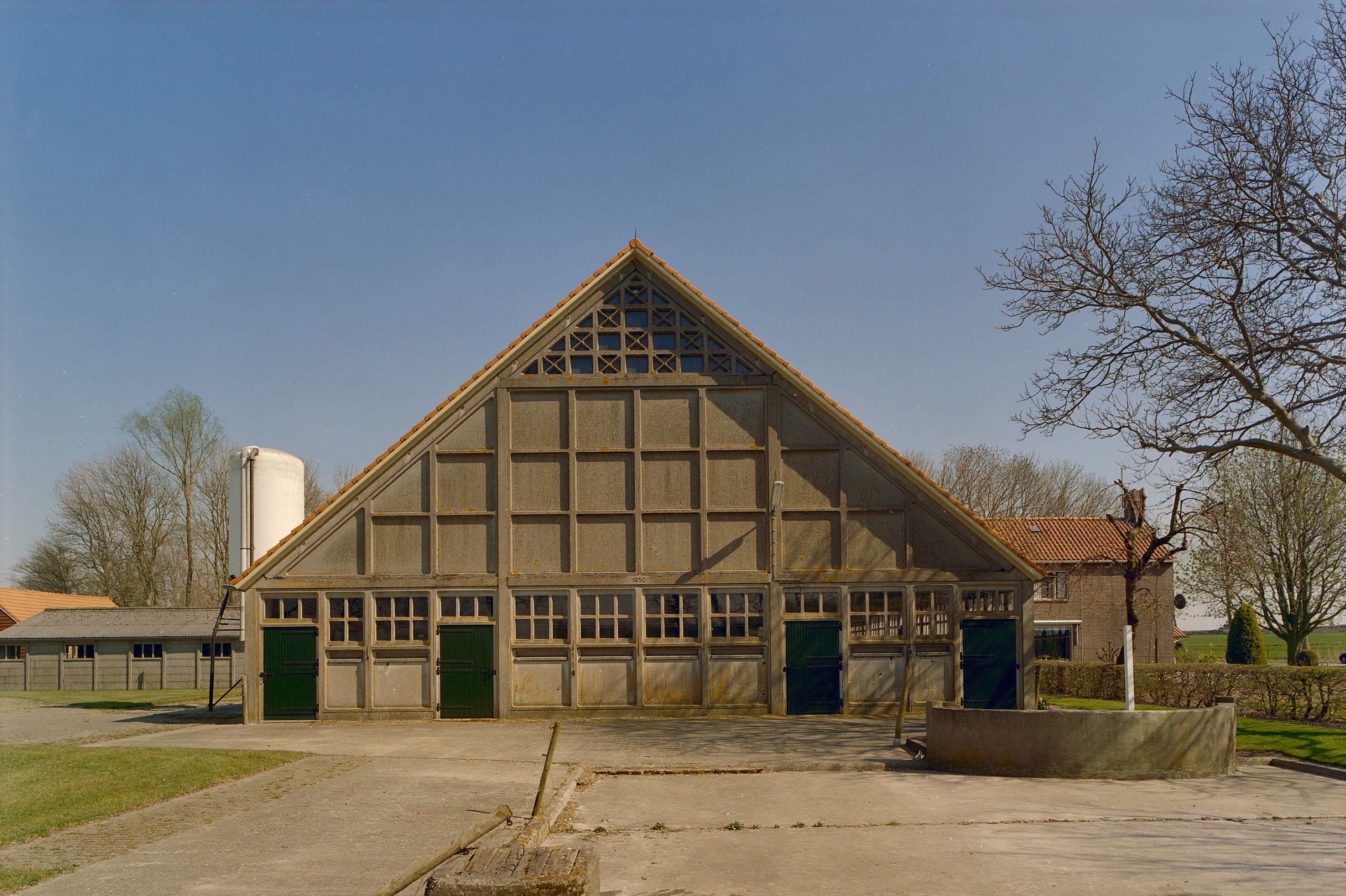 Wederopbouw/ Boerderijen: Overzicht voorgevel schuur bij boerderij, in de Noordoostpolder (opmerking: Gefotografeerd voor Toonbeelden van de Wederopbouw)